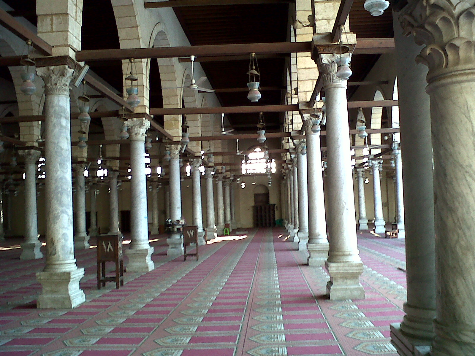 جامع عمرو بن العاص، القاهرة.